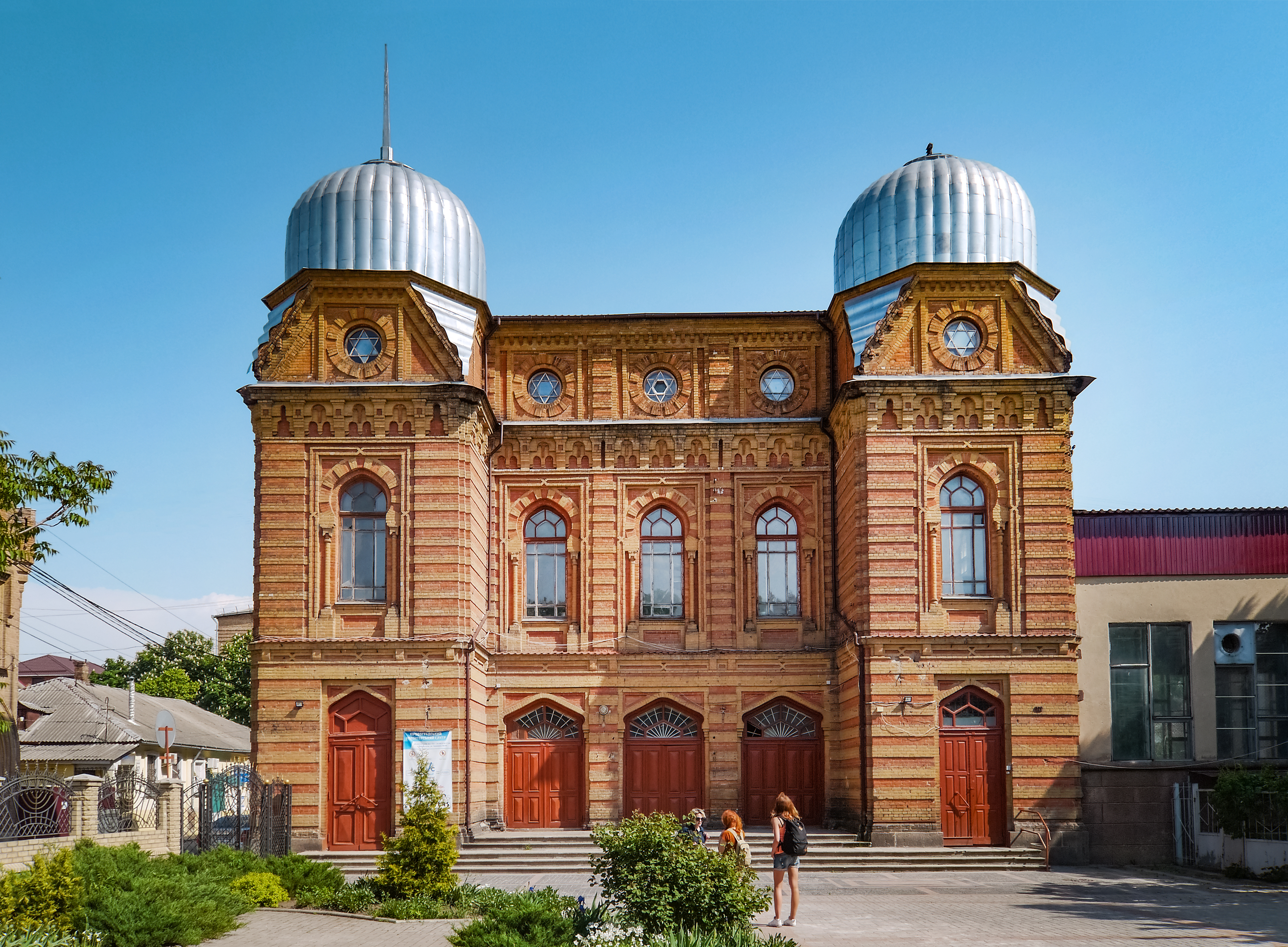 Синагога, Кропивницький, вул. В. Чміленка (Дзержинського), 90/40 (ріг Пашутінської)